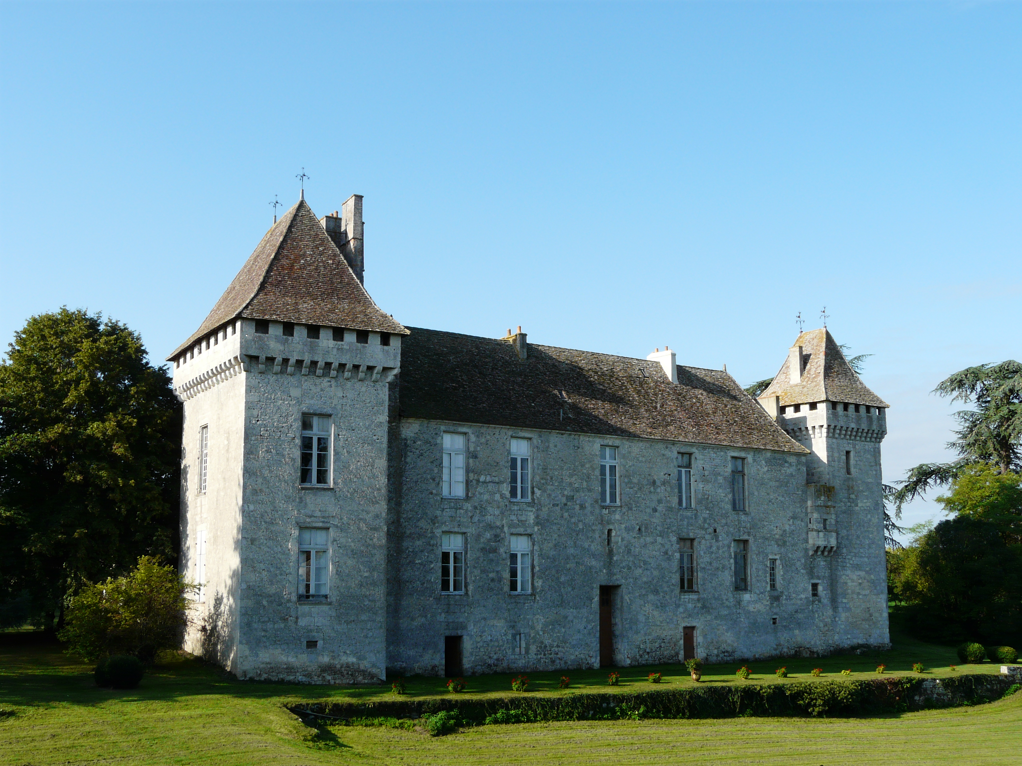 La façade nord du château de Gageac, Gageac-et-Rouillac, Dordogne, France. .